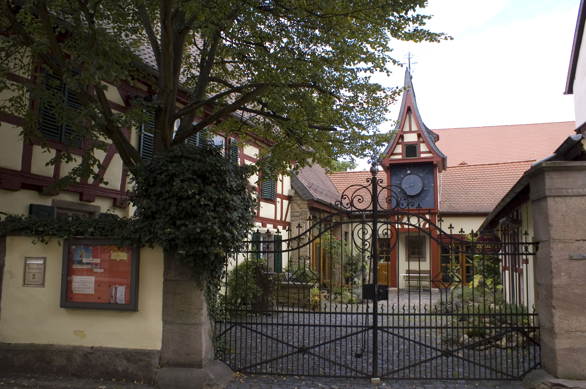 Schloßstraße 10: ehemalige Wohnhaus, heute Uhrenstube und Pfälzisches Turmuhrenmuseum; teilweise Fachwerk, 18. Jahrhundert, bezeichnet 1825 (wohl Umbau), ehemalige Scheune